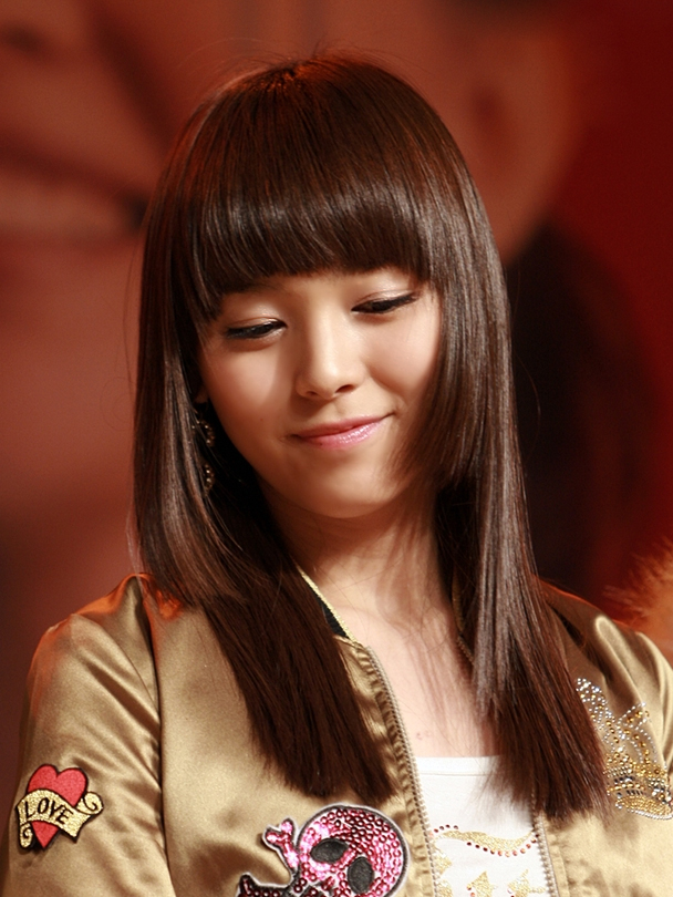 영화 《뜨거운 것이 좋아》 특별 시사회에 참석한 원더걸스의 선예